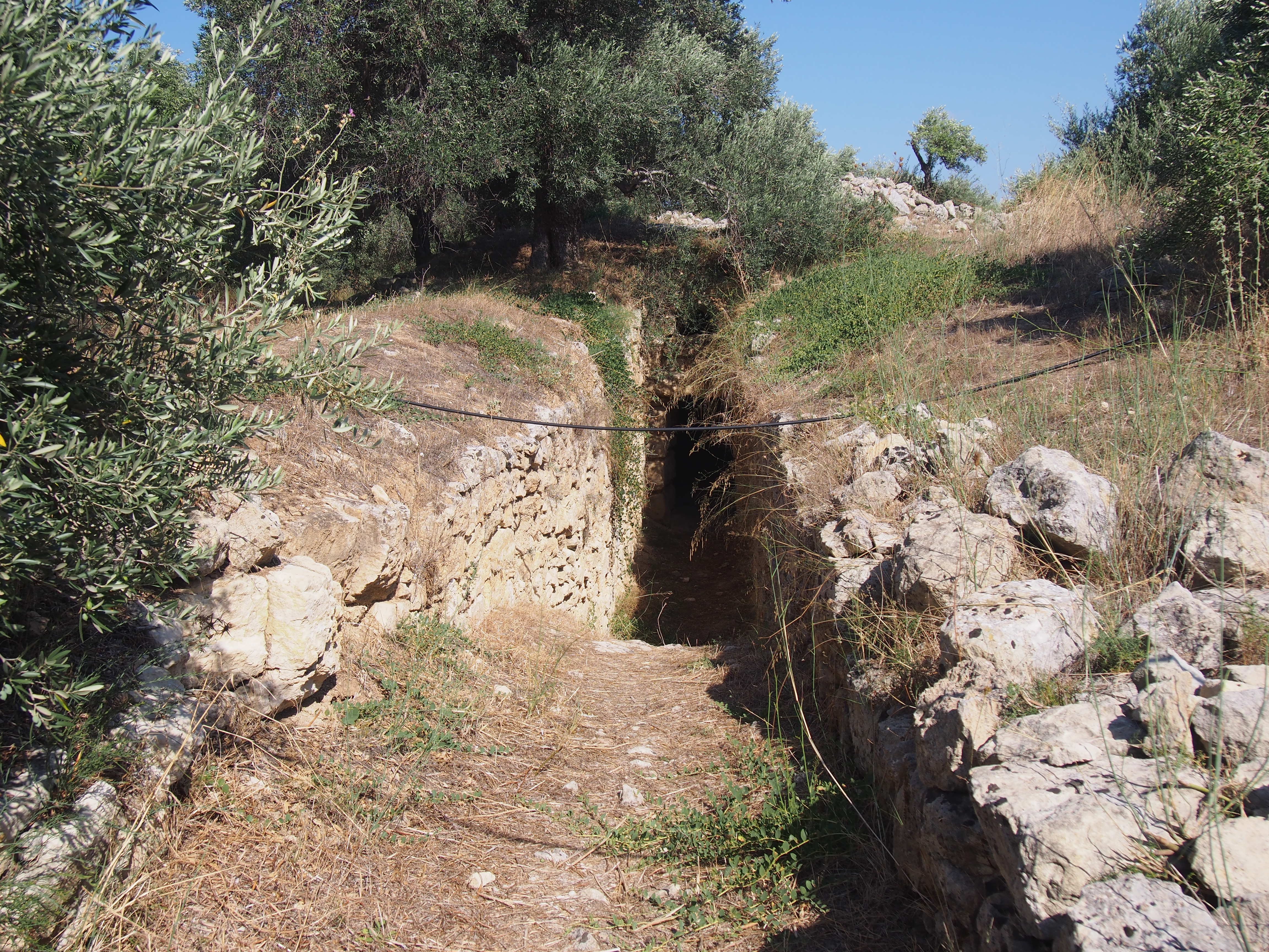 Στύλος, θολωτός τάφος στη θέση Αζοϊρές«Στύλος, θέση Αζοϊρές»